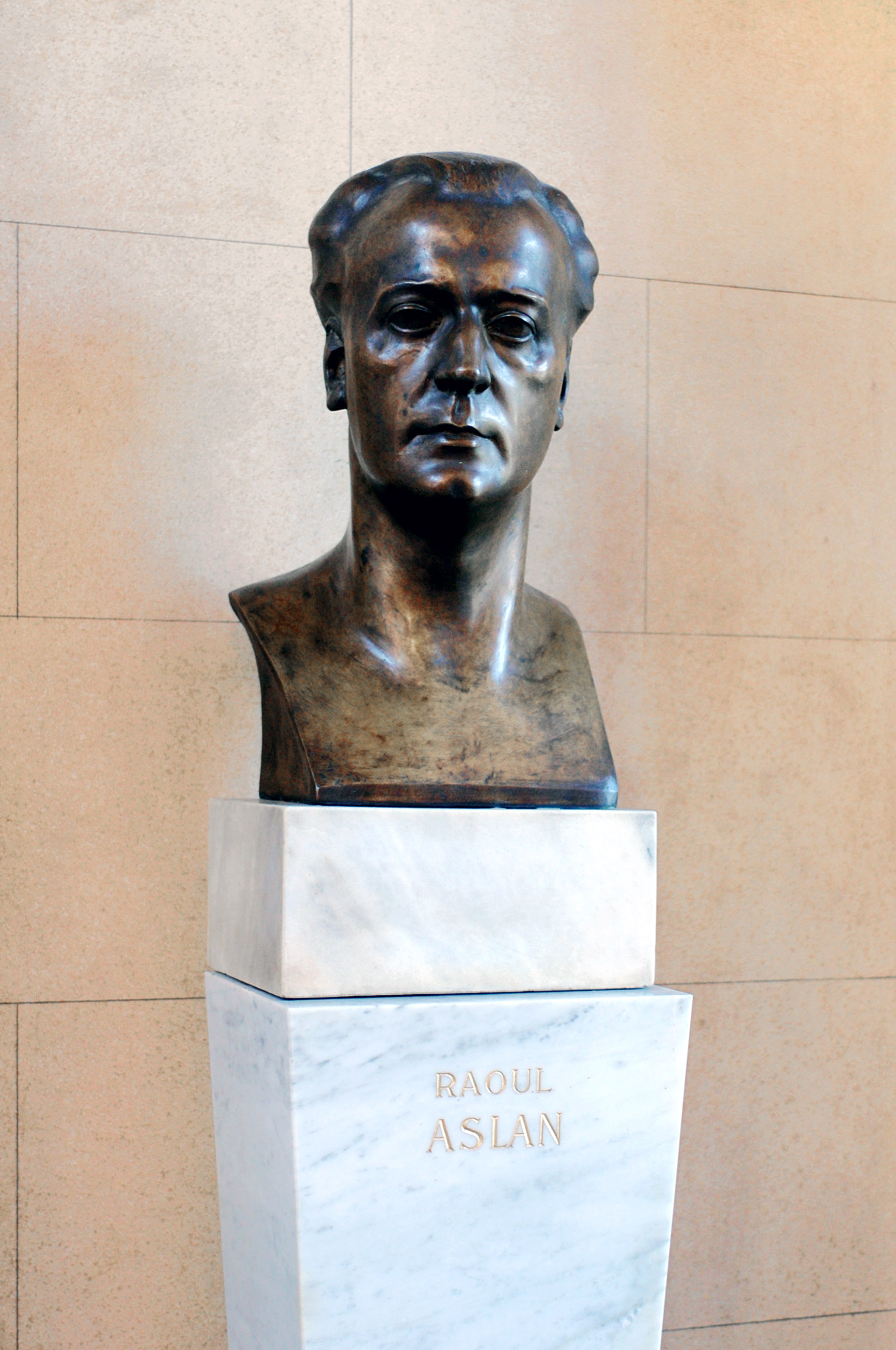 Raoul Aslan-Büste (16.10.1886-17.6.1958), Kammerschauspieler. Von 1945-1948 Direktor des Burgtheaters im Ronacher (Ausweichspielstätte). Büste im Burgtheater von André Roder (Feststiege).